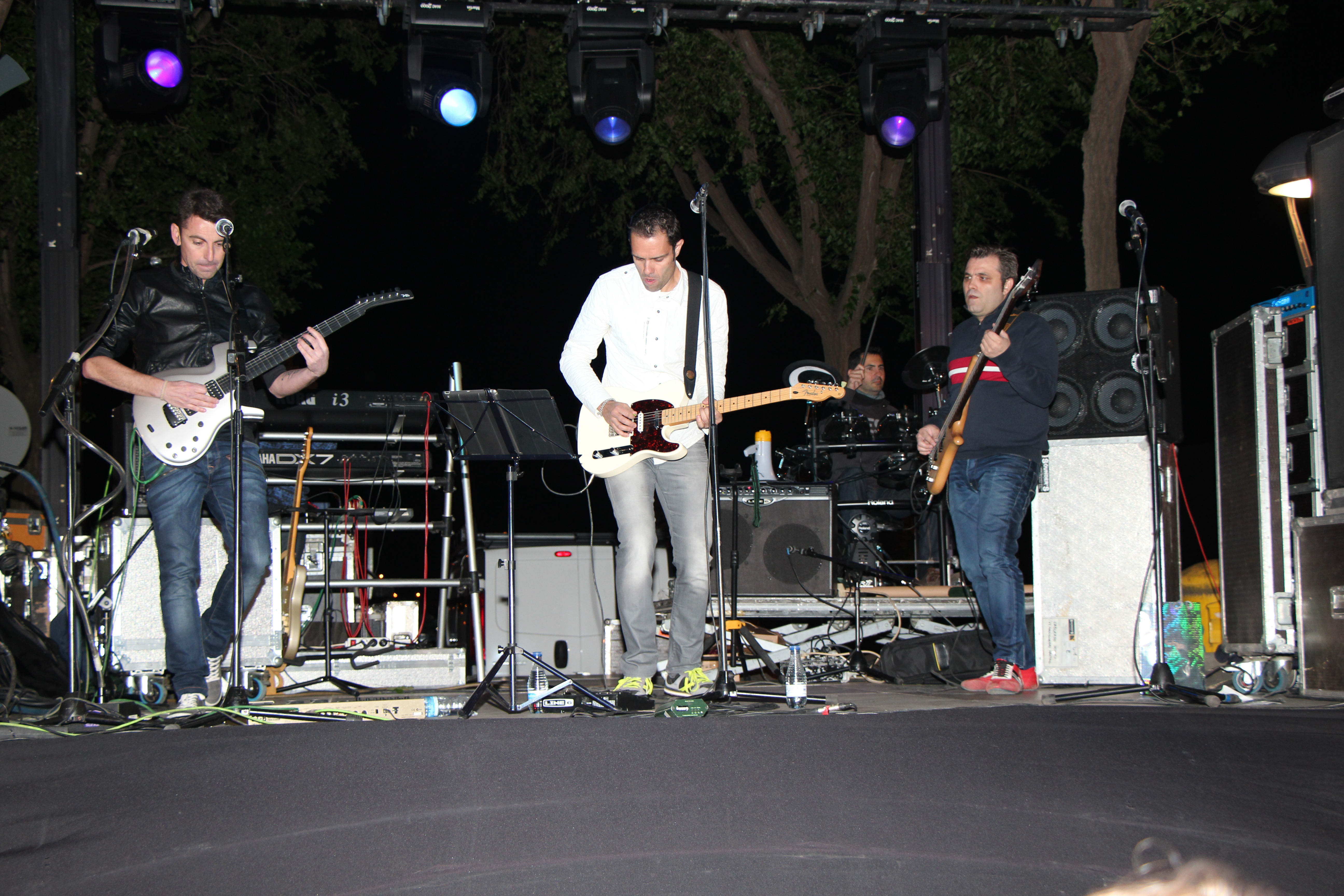 Es veuen els components del grup durant una actuació al barri de Cappont de Lleida